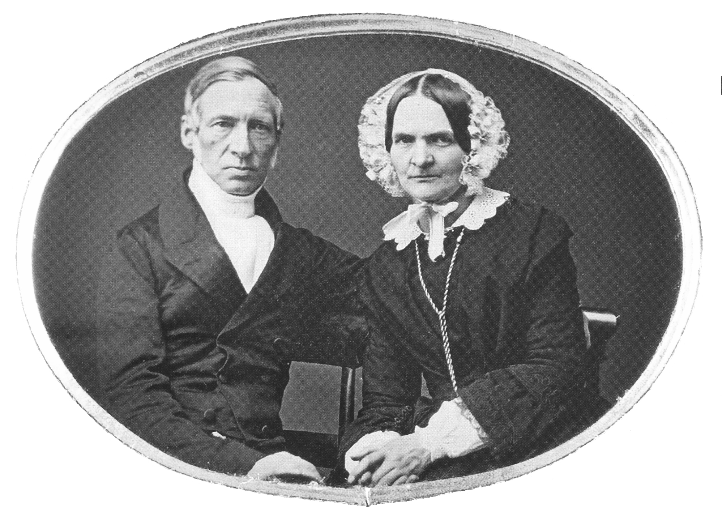 Senator Hermann Wilhelm Hach und seine Frau Ernestine, geb. Heise. Daguerreotypie 14,6 x 10,9 cm (seitenrichtig gespiegelt). Original: Archiv der Hansestadt Lübeck